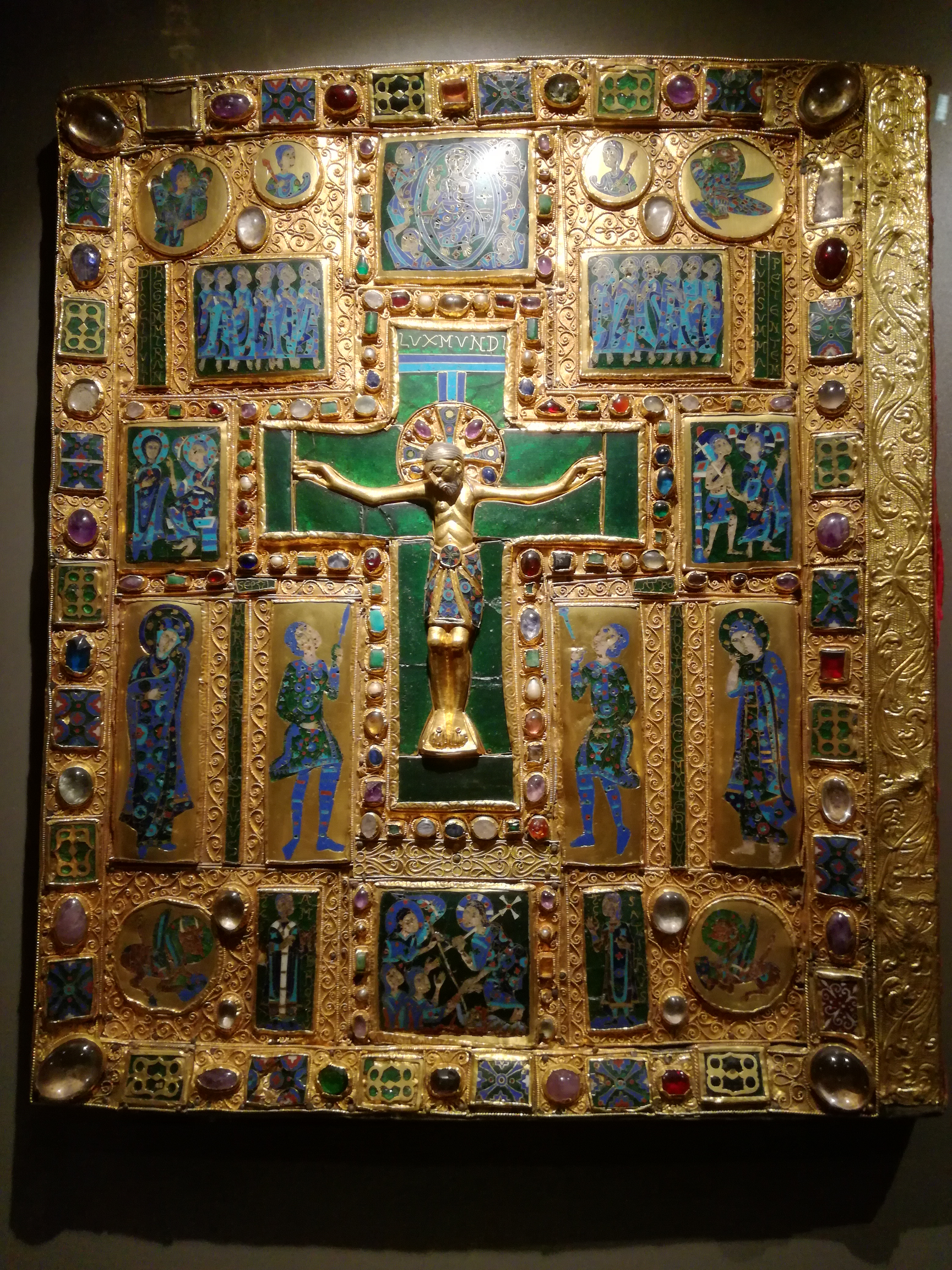 Evangeliario di Ariberto, capolavoro dell’arte orafa medioevale dell’XI secolo realizzata tra il 1034 e il 1036 con la tecnica degli smalti cloisonnés